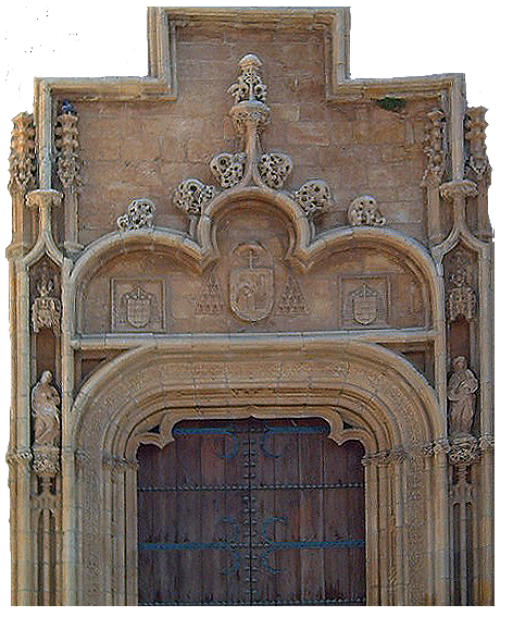 Portada occidental de la Catedral de Alcalá de Henares recortada de su fondo.